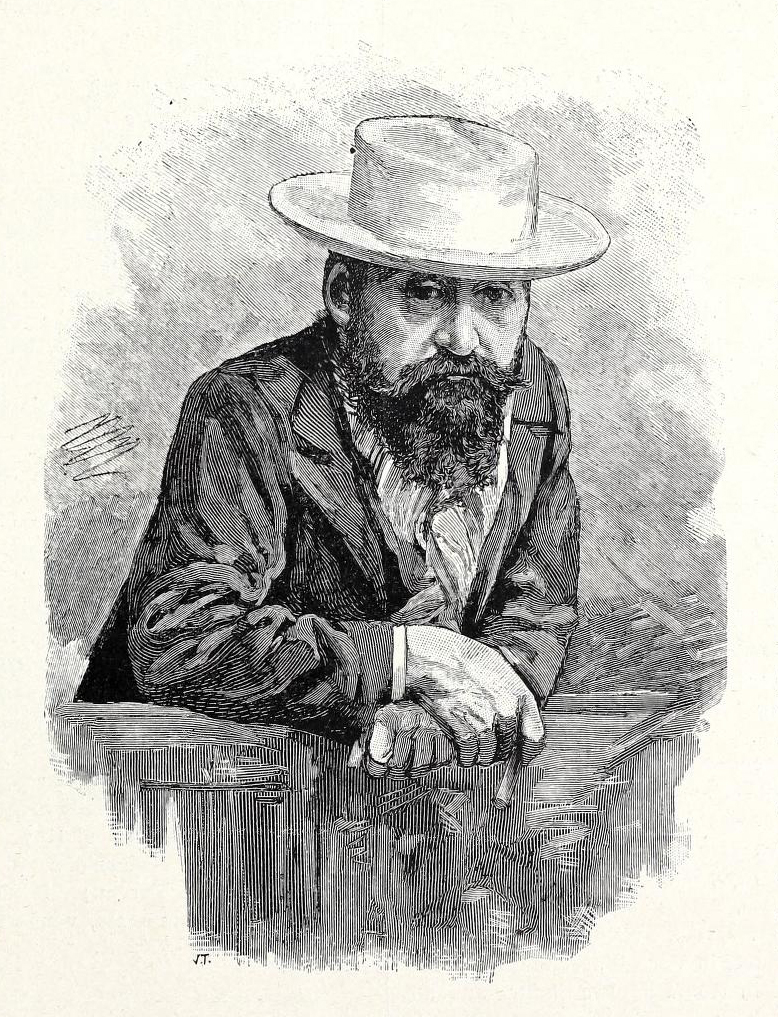 Ercole Rosa (1846.1893), da L'Edilizia Moderna (1896)